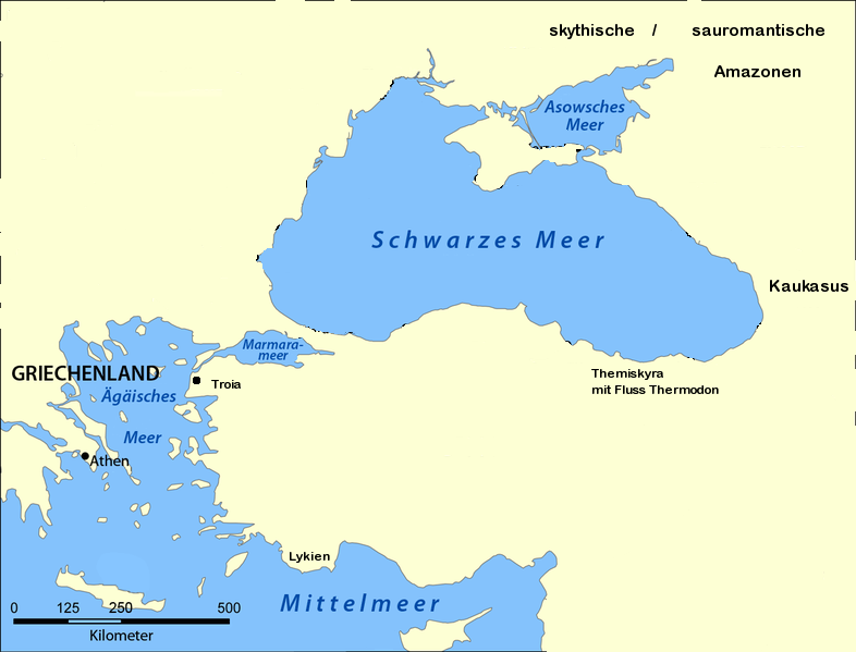 Karte mit Orten an den Amazonen in der Werken antiker griechischer Autoren auftreten